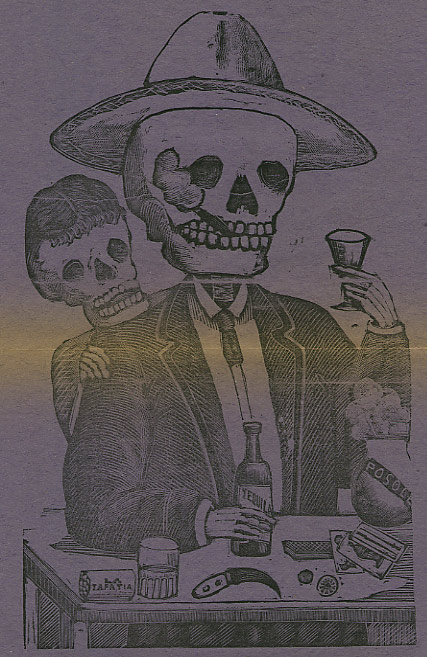 Calavera Tapatía / Skeleton from Guadalajara, Metal engraving